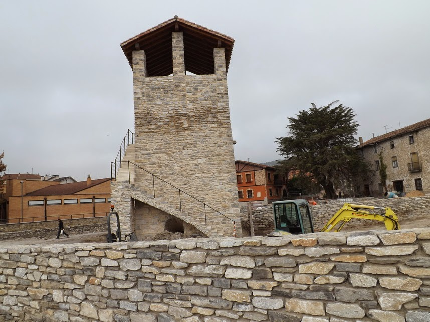 El Calero de Nanclares de la Oca (Álava) en proceso de restauración.